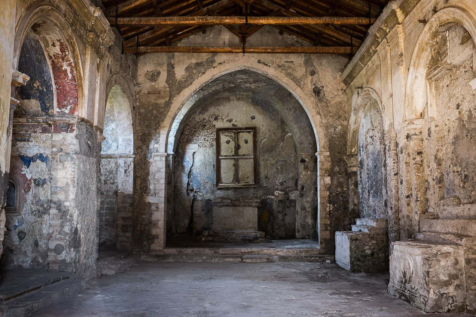 Chiesa dell'Annunziata This is a photo of a monument which is part of cultural heritage of Italy.